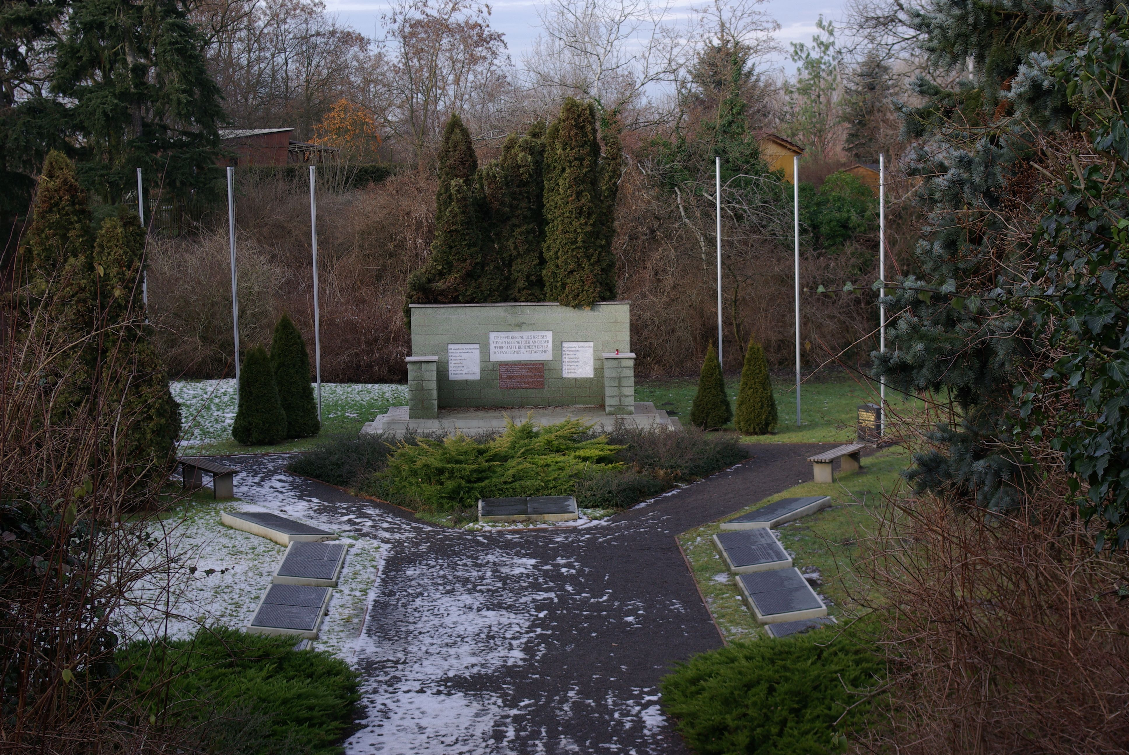 Brandenburg, Großbeeren, die Gedenkstätte an das Arbeitslager